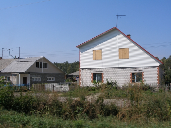 Дома на окраине Лебяжьего. Барнаул.